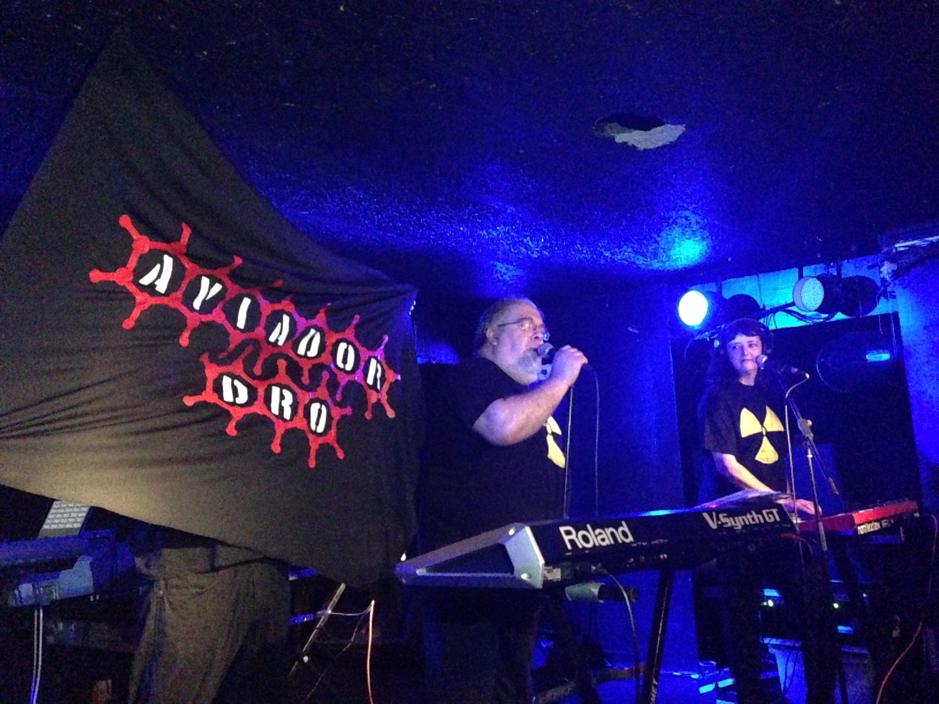 Concierto en la Sala Be Cool de Barcelona